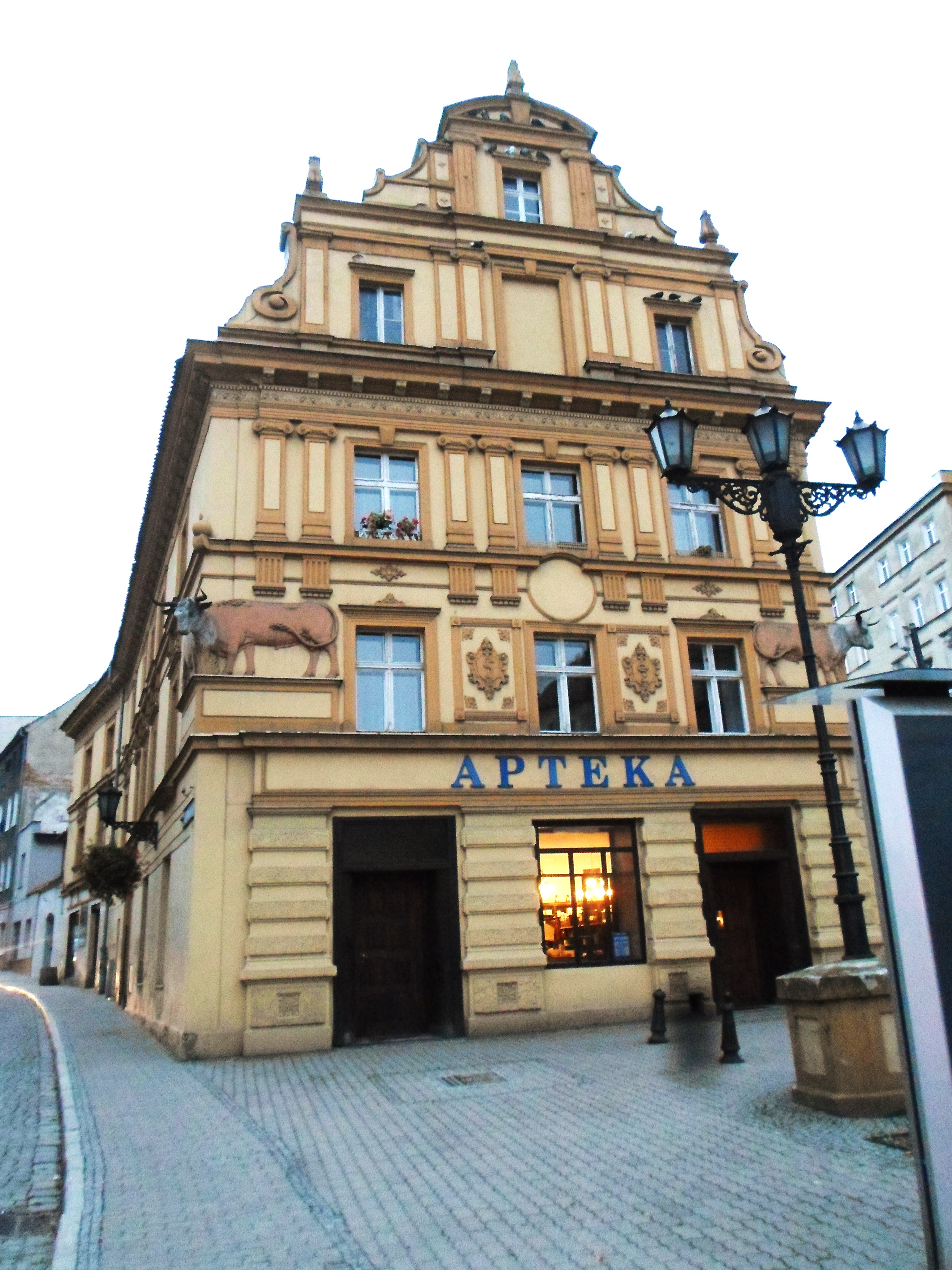 Apteka "Pod Bykami" w Świdnicy